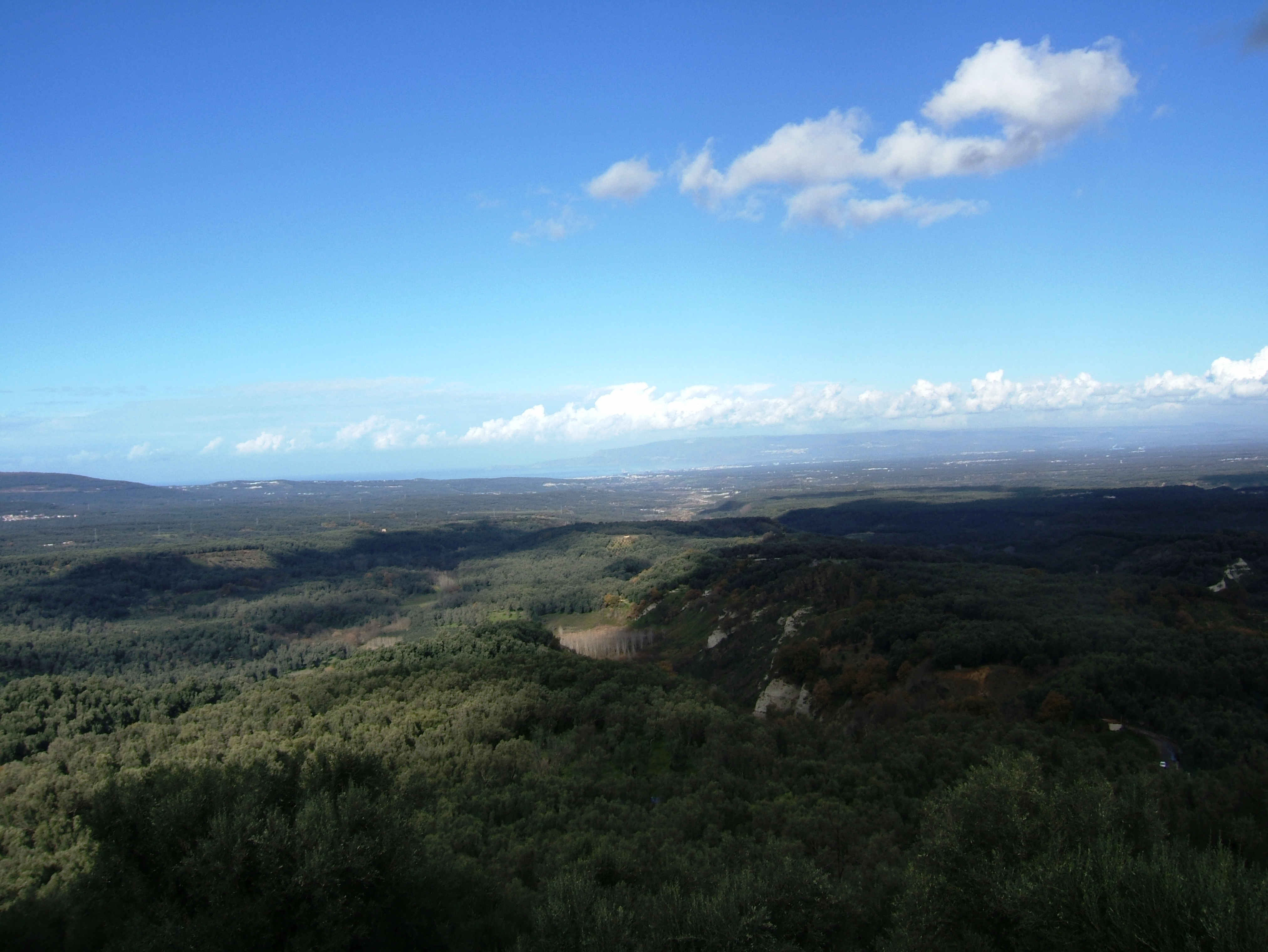 Panorama Golfo Gioia Tauro da Cosoleto (RC)